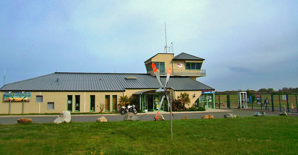 Aérogare de l'aéroport de Granville-Mont-Saint-Michel (50)